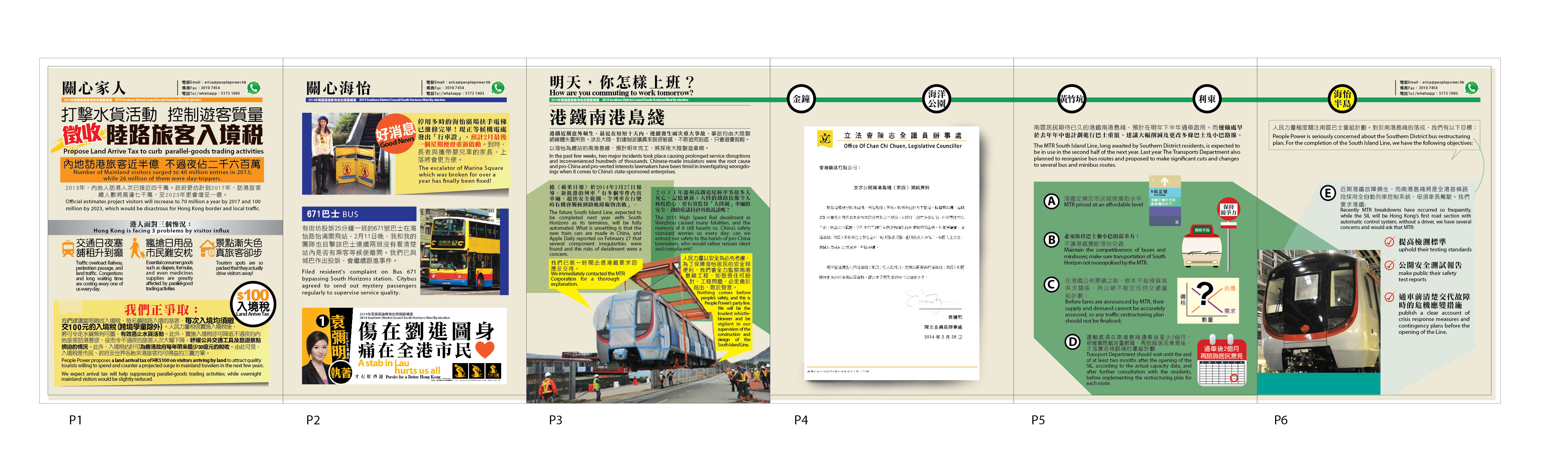 人民力量主席袁彌明參選海怡西補選的宣傳單張，第二款，背面。除了各項涉及海怡半島屋苑的民生議題，也包括了全港範圍的民生事務：自由行泛濫，人民力量主張收取「陸路旅客入境稅」100圓，以減少低消費旅客。